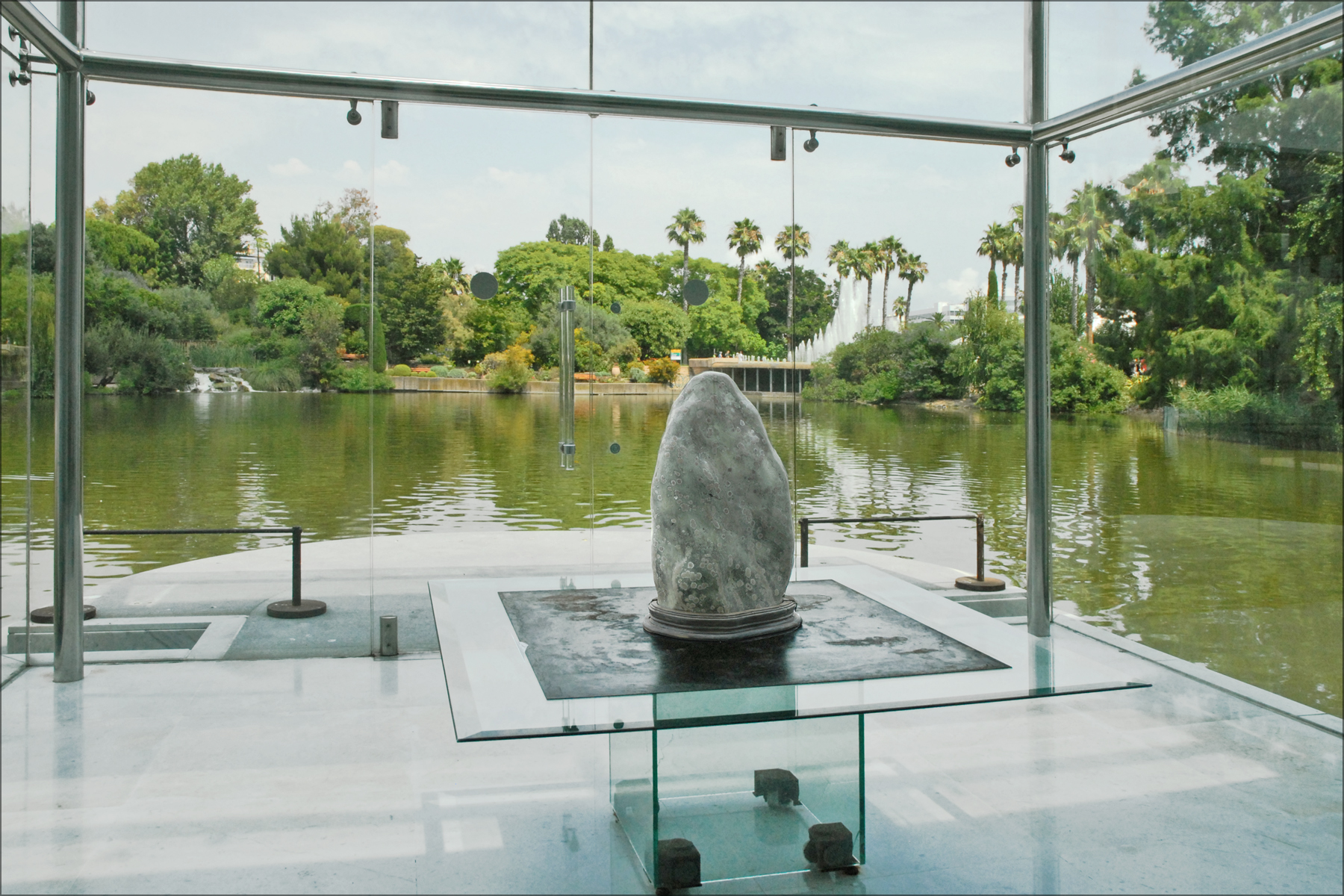 Au centre, Pierre d'immortel à fleurs de prunier (ouverture donnant sur le parc Phoenix) Corée Pierre Achat 1998 musée des arts asiatiques Nice ______________ Ce musée, inauguré en 1998, a été conçu par l'architecte japonais Kenzo Tange (1913-2005) au sein du parc Phoenix à Nice (le parc Phoenix est un parc floral situé près de l'aéroport). L'initiative de cette construction remonte à l'époque de Jacques Médecin (1928-1998) , maire de Nice de 1966 à 1990 qui souhaitait y exposer des oeuvres de Pierre-Yves Trémois et des pièces d'art asiatique que l'artiste se proposait de donner à la ville de Nice. C'est P.-Y. Trémois qui aurait incité les responsables politiques à choisir ce célèbre architecte plutôt qu'un architecte local. En raison de la fuite à l'étranger de Jacques Médecin et de sa condamnation pour corruption, le projet initial a été abandonné et l'édifice est resté inoccupé durant plusieurs années. Le projet a été par la suite transformé par le conseil général des Alpes maritimes en musée des arts asiatiques, avec le soutien de la direction des musées de France et le concours du musée Guimet. Le premier conservateur du musée Marie-Pierre Foissy-Aufrère a brillamment relevé le défi de faire un musée évoquant les grandes civilisations asiatiques, de l'antiquité à aujourd'hui, dans un espace certes exceptionnel mais extrêmement exiguë. ___________________ "Le plan du musée repose sur deux formes géométriques fondamentales de la tradition japonaise; le carré, symbole de la terre,et le cercle, symbole du ciel....." Kenzô Tange site officiel article de Wikiipedia sur l'architecte